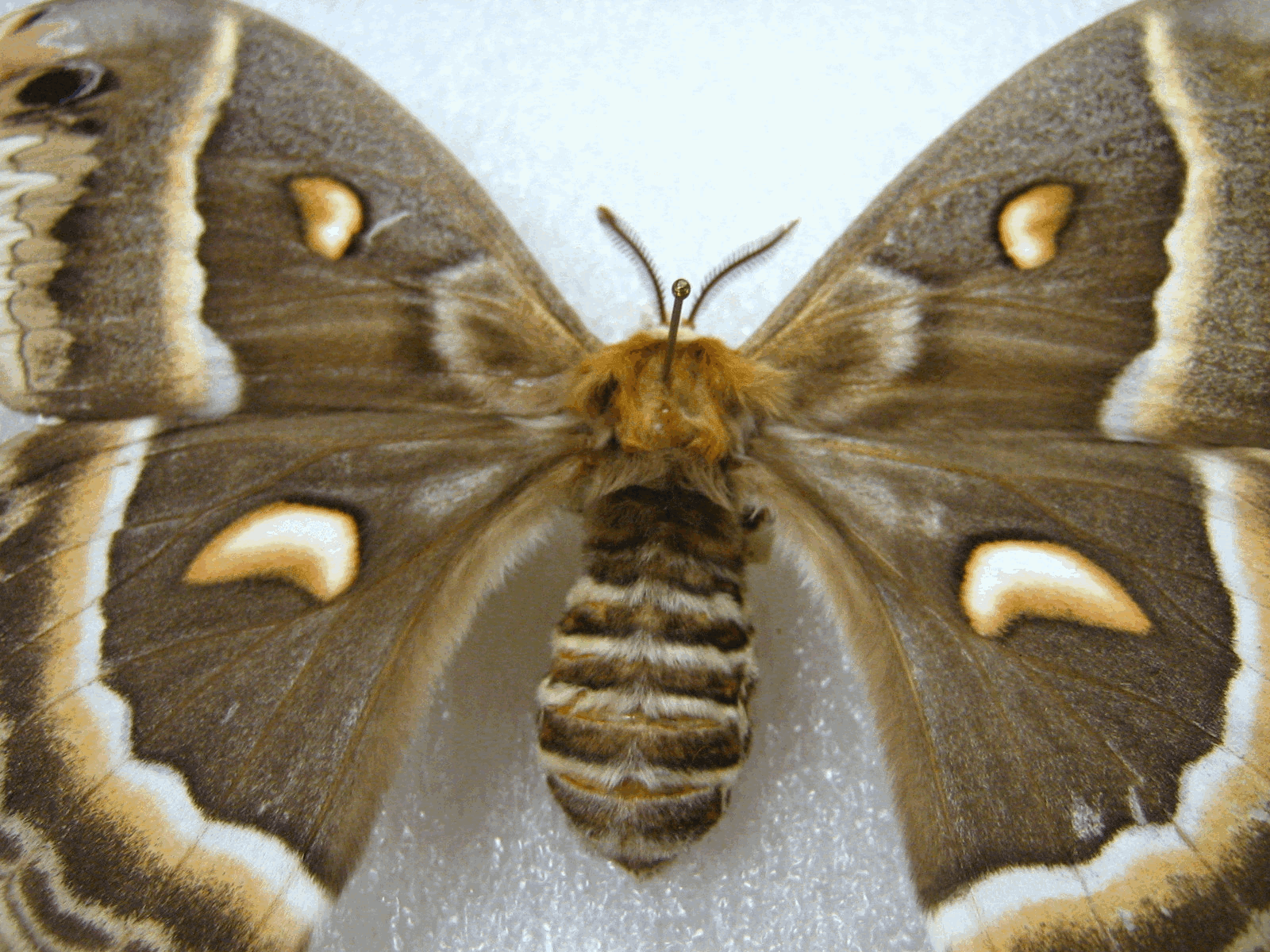 adulte